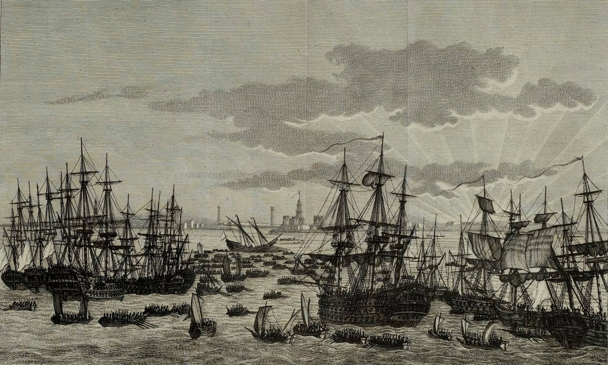 Débarquement des troupes de Napoléon en Egypte en juillet 1798, Musée de la Révolution française - Vizille.